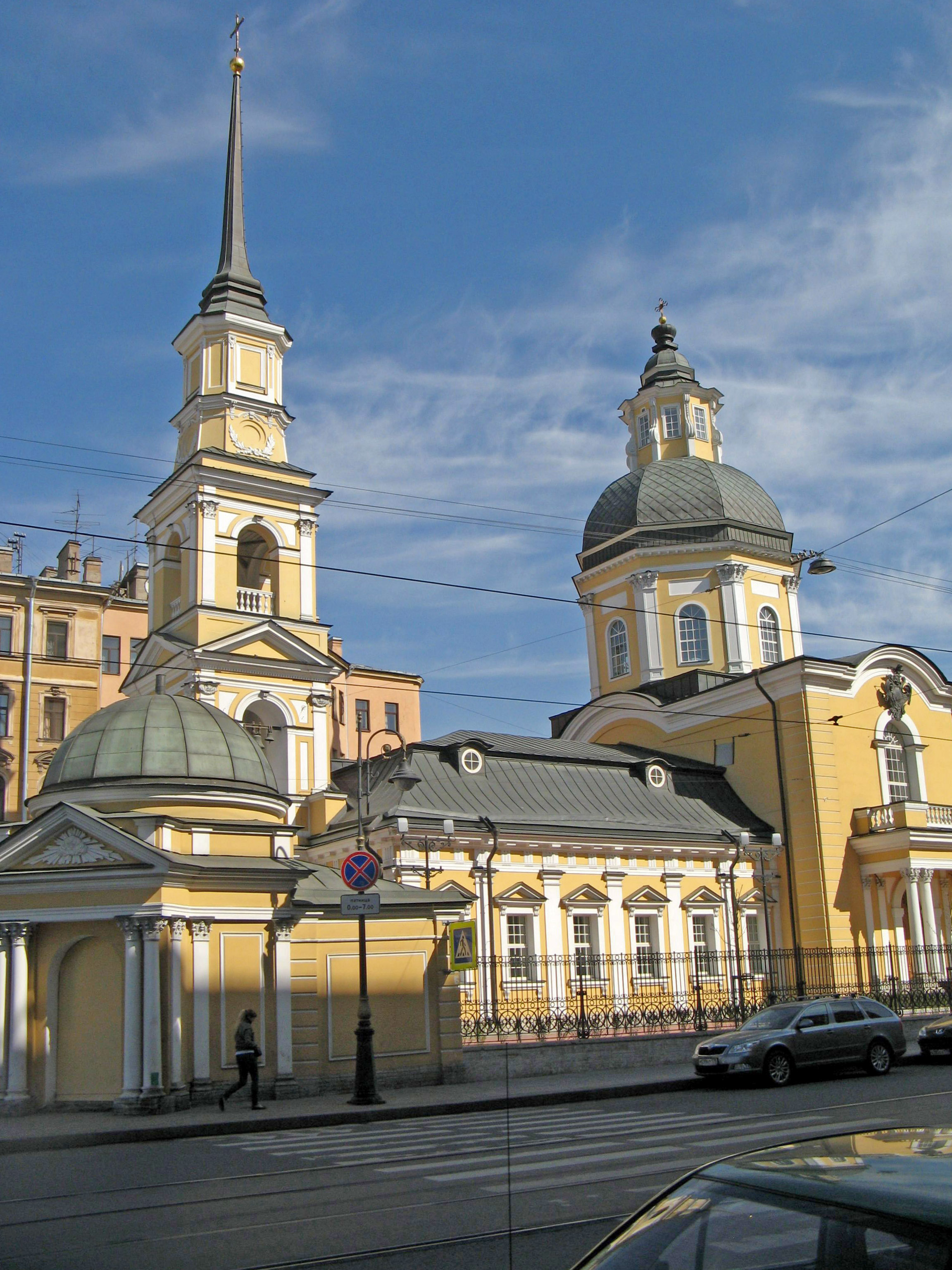 Церковь Праведников Симеона Богоприимца и Анны Пророчицы (Санкт-Петербург и Лен.область, Санкт-Петербург, Моховая улица, 48, Белинского улица, 4)